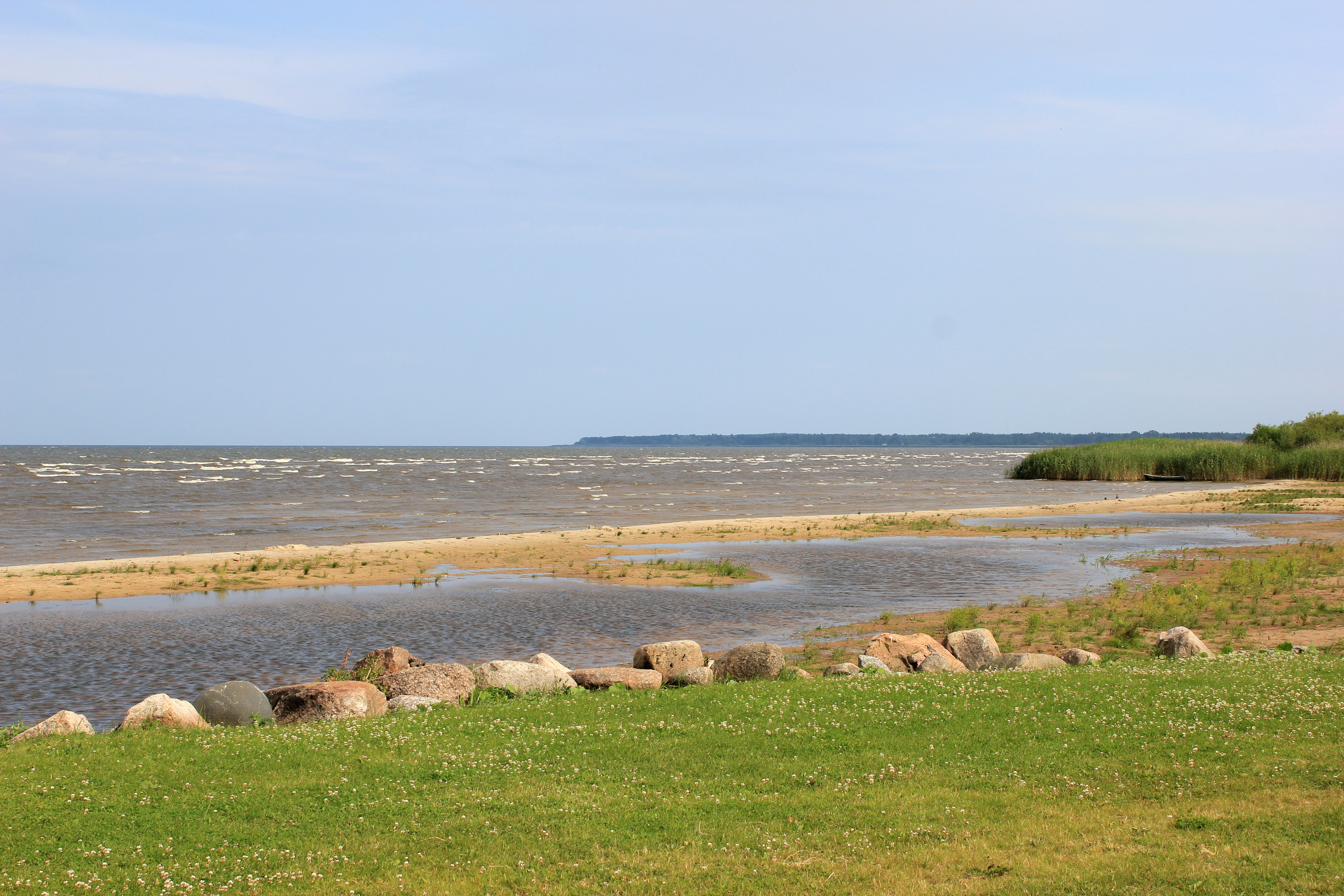 Am Peipussee bei Mustvee, Estland.Hornjoserbsce: Při Peipuskim jězorje pola Mustvee, Estiska.